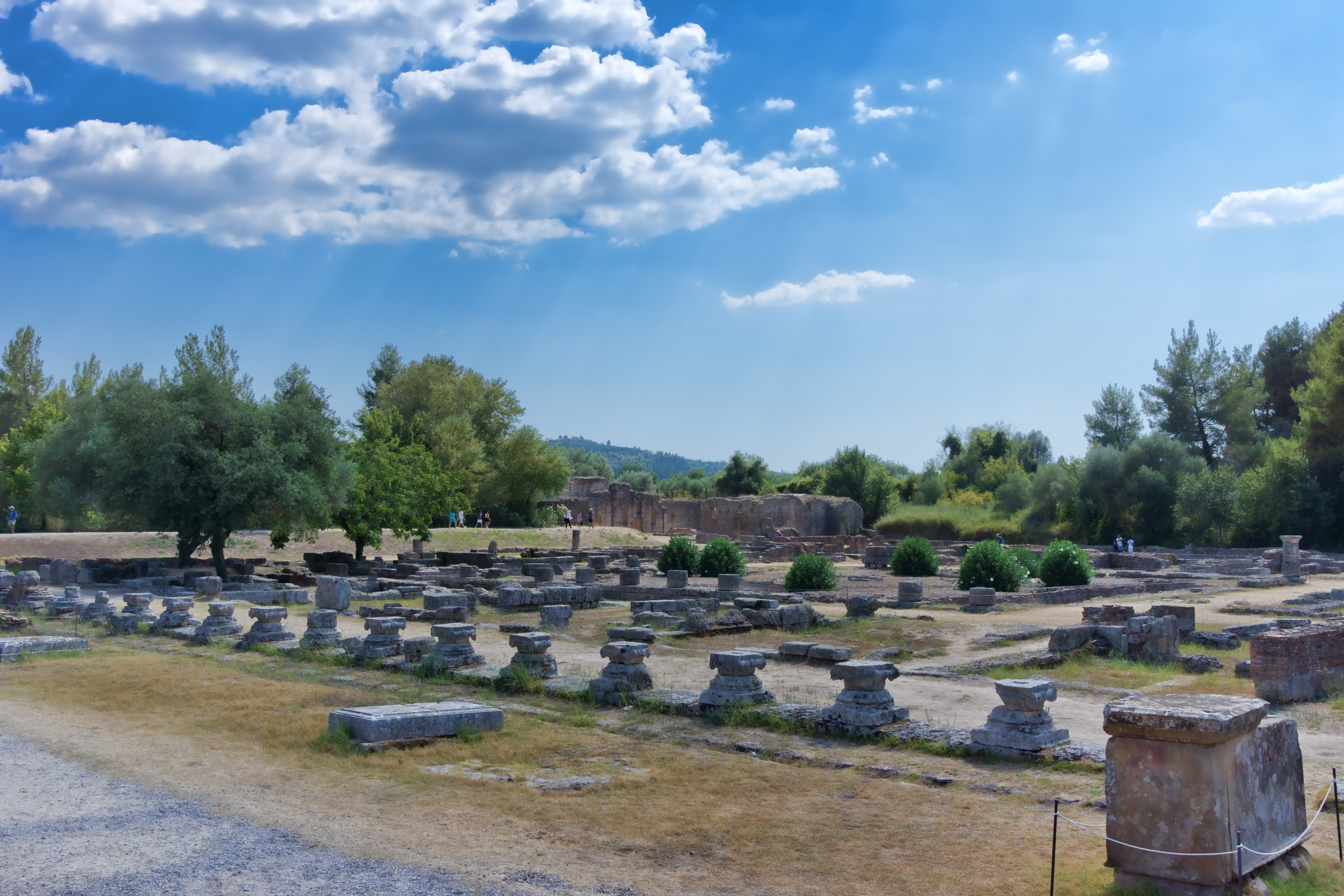 Léonidaion à Olympie (Grèce)